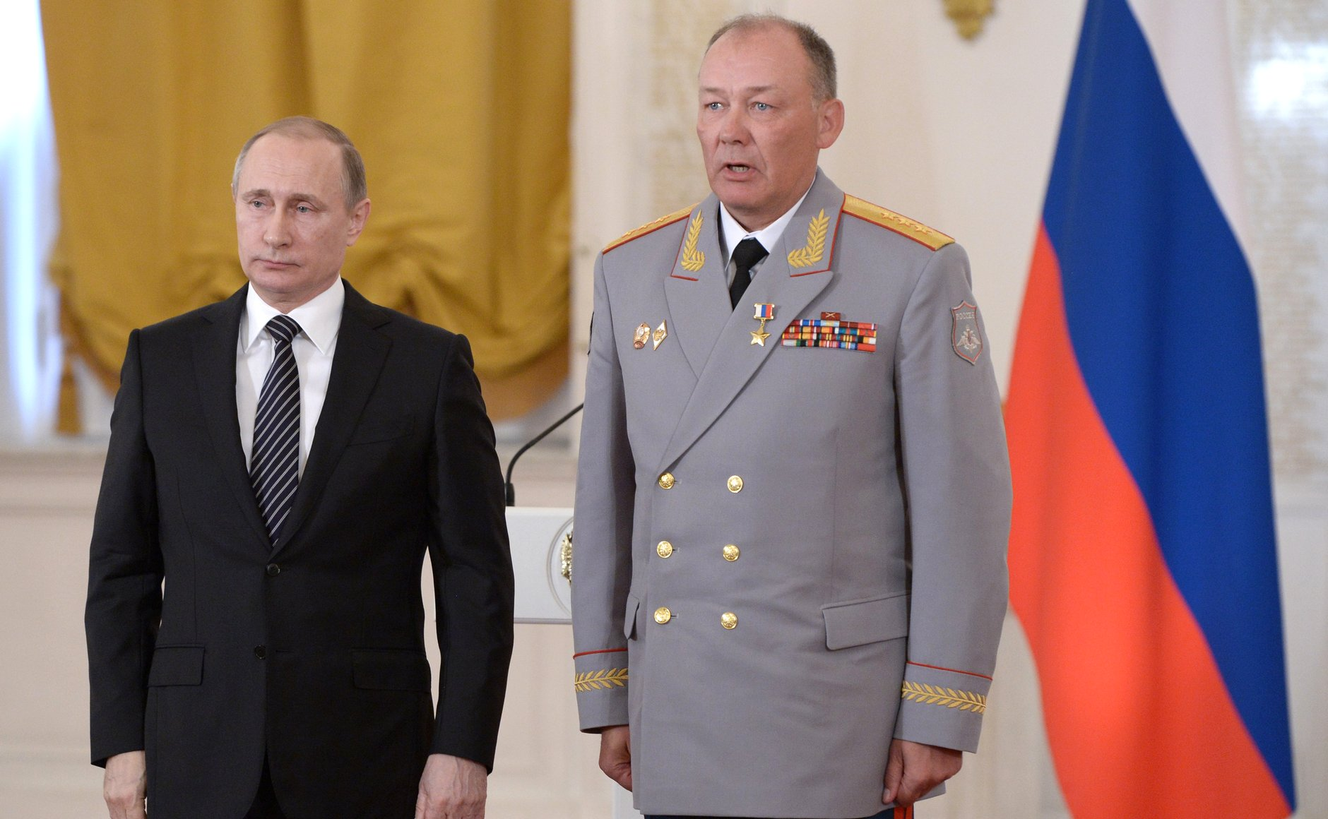 Звание Героя Российской Федерации присвоено генерал-полковнику Александру Дворникову